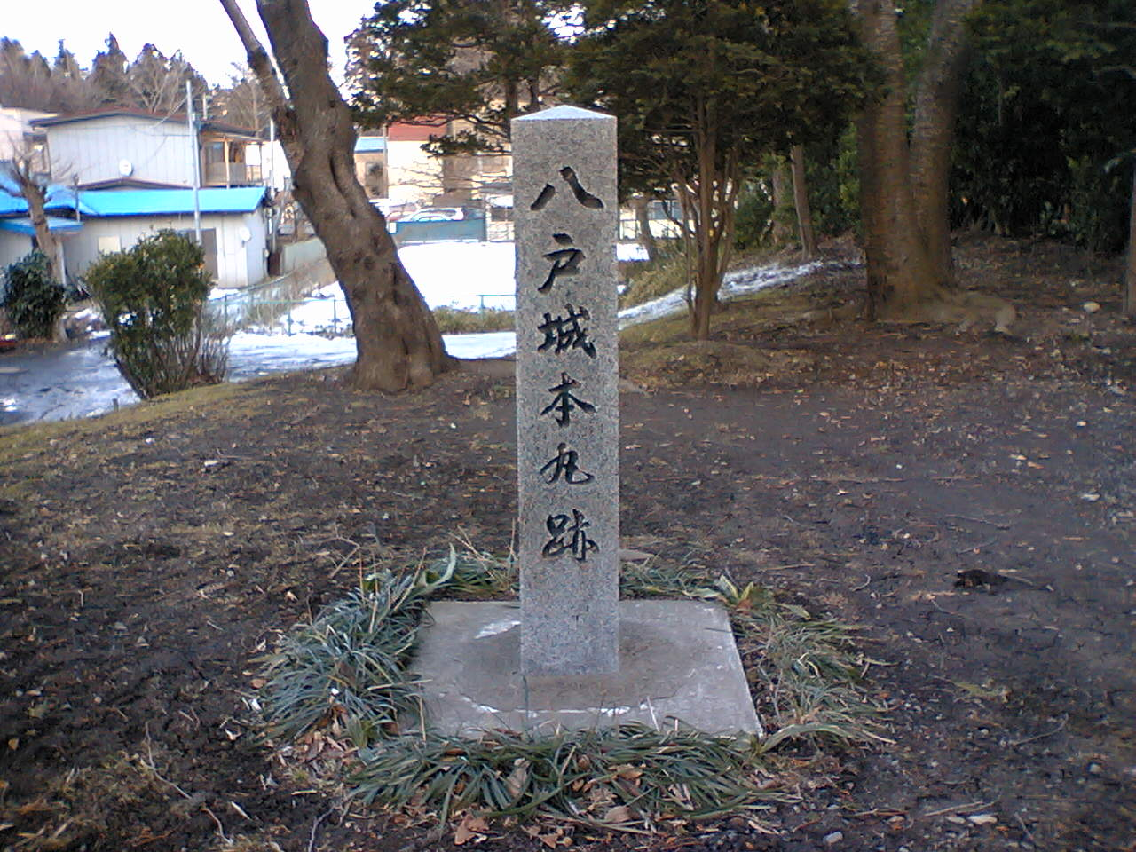 八戸城・本丸跡碑（八戸市内丸） (UCHIMARU, HACHINOHE, AOMORI, JAPAN)